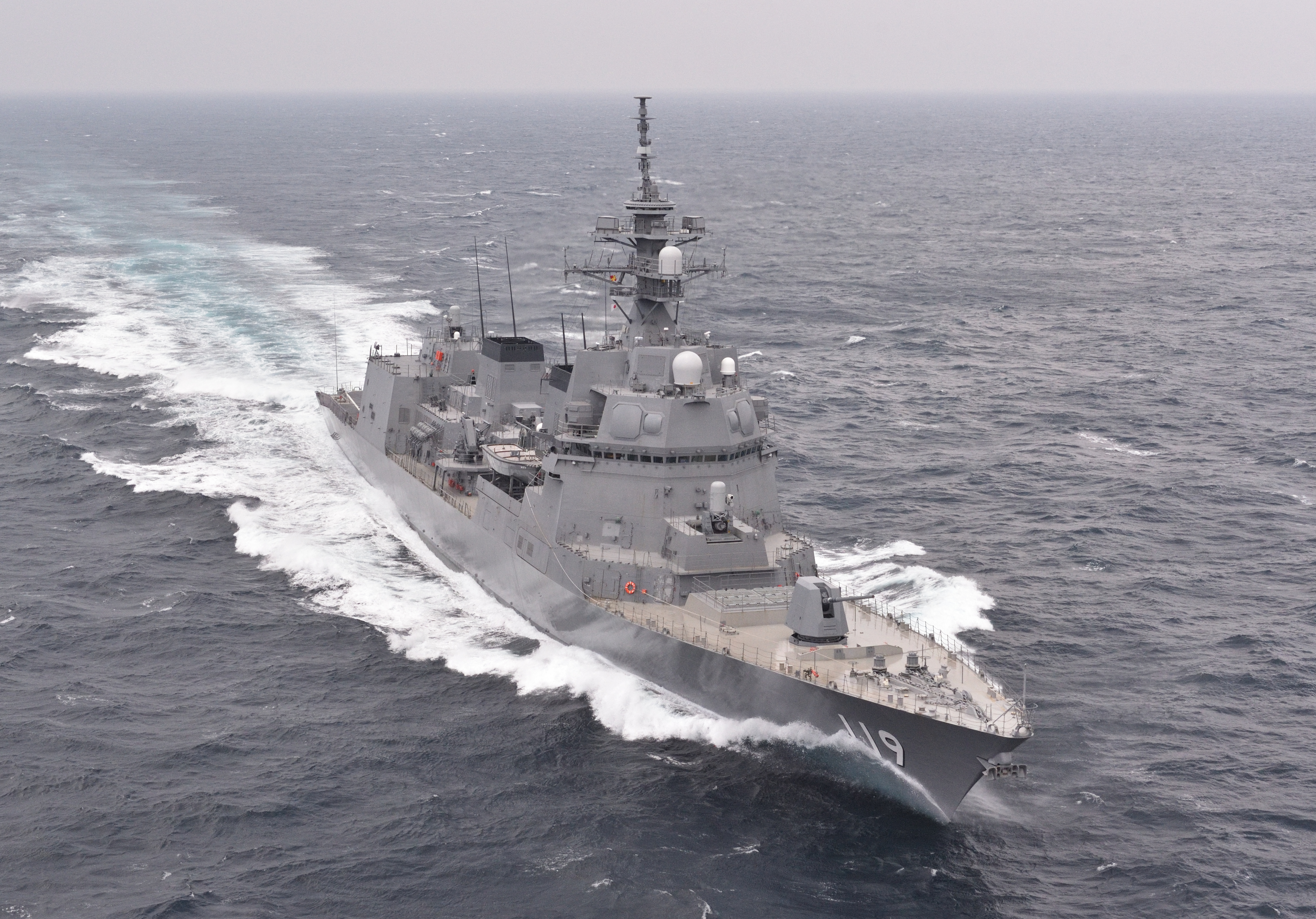 護衛艦「あさひ」